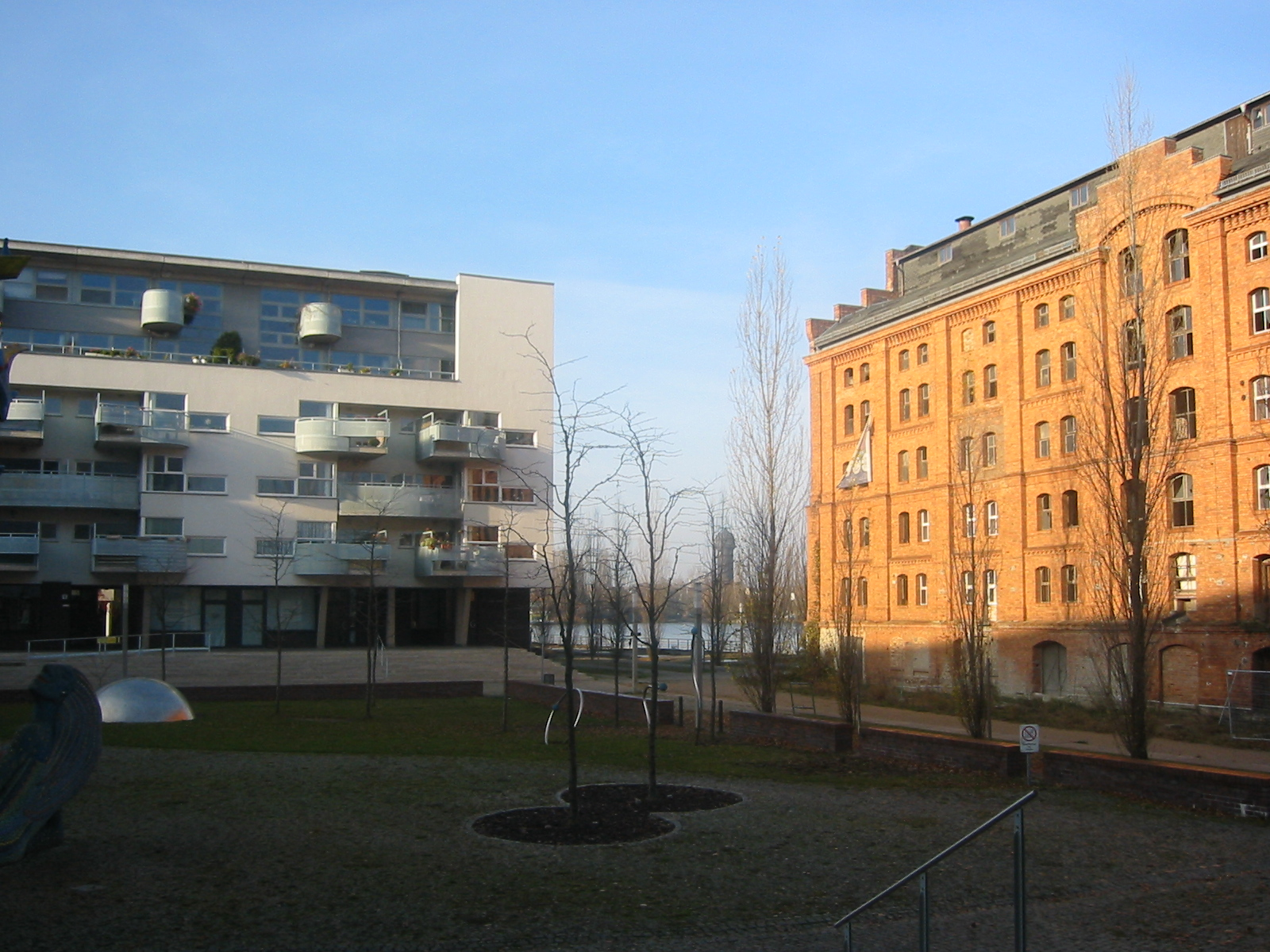 Palmkernölspeicher, Berlin